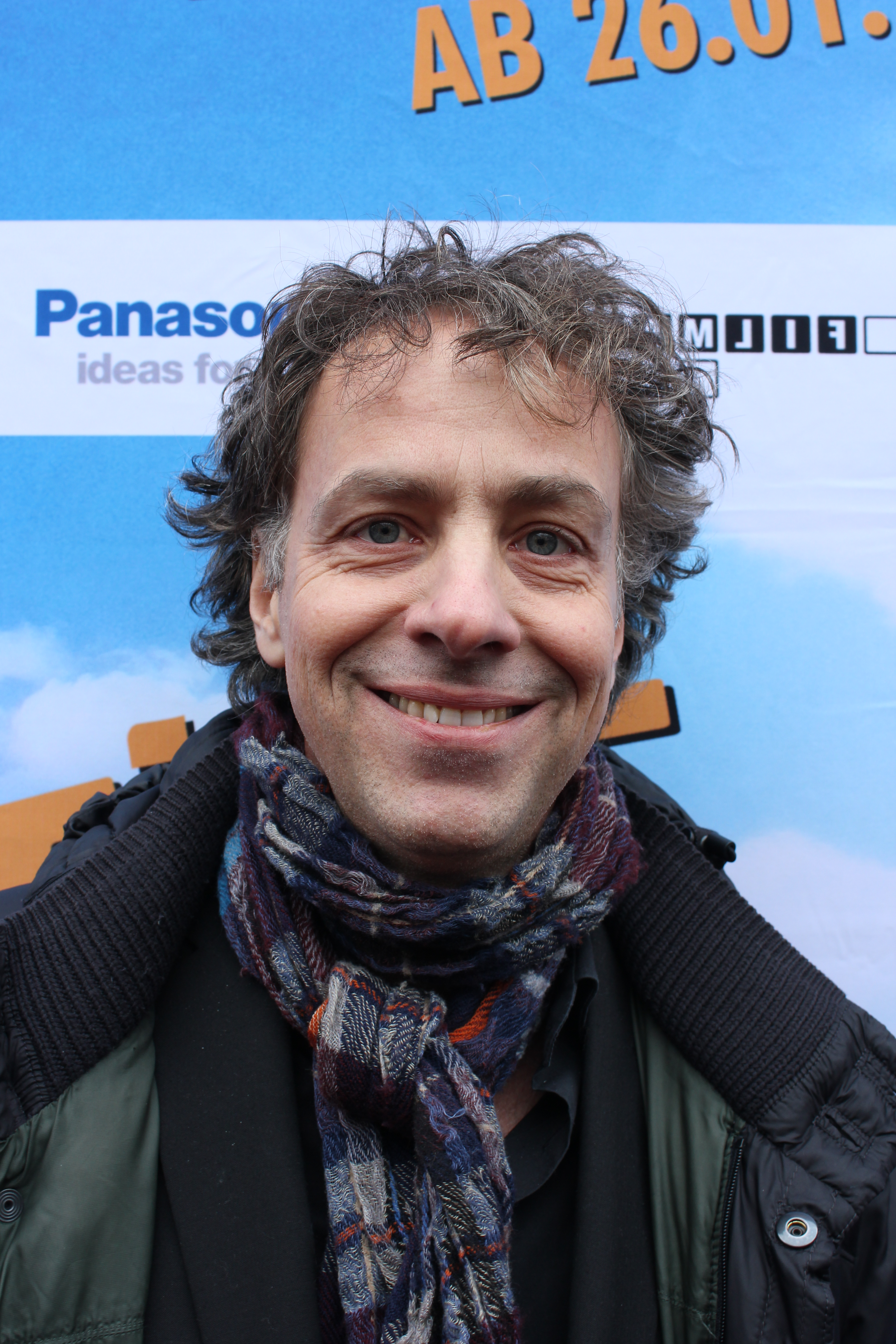 Portrait-Aufnahme von Andreas Ulmke-Smeaton bei der Schleswigpremiere des Fünf Freunde Films (28. Januar 2012).